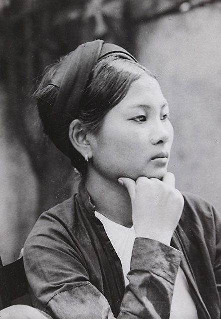 中文（香港）: 1915年河內少女